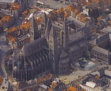 Notre-Dame de Tournai קתדרלת טורנאי